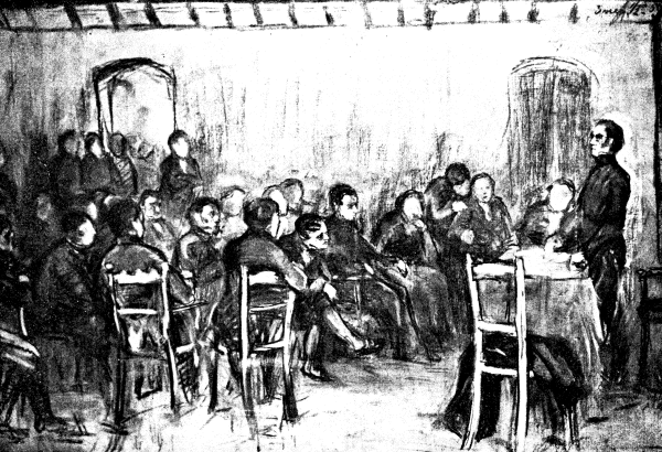 Obra del pintor uruguayo Carlos María Herrera (1875 - 1914) "Congreso de abril de 1813", boceto al carbón de 145 x 105cm.